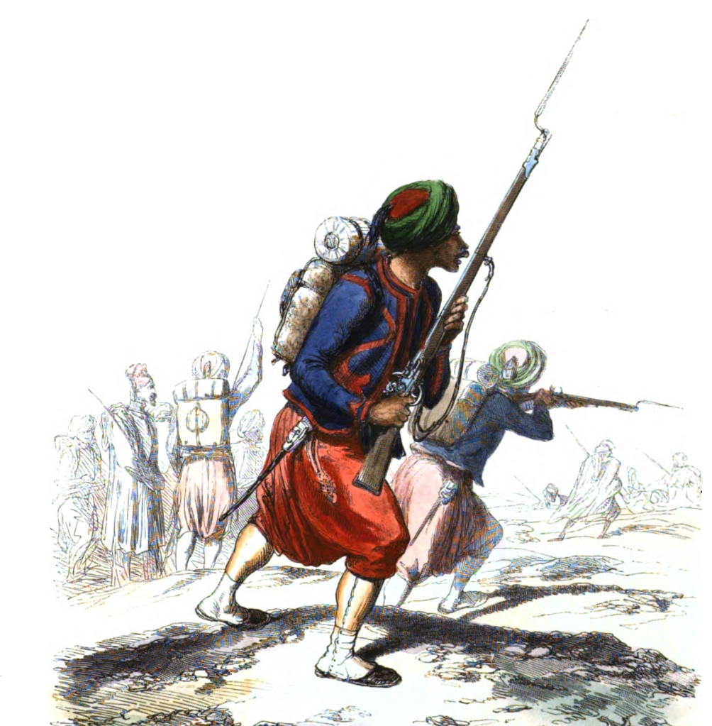 Régiments envoyés en Afrique de 1830 à 1843 - Zouaves